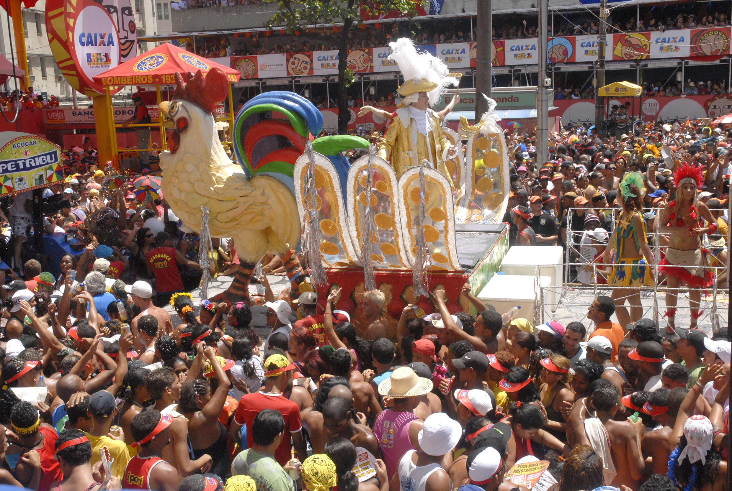 O Galo da Madrugada, Carnaval do Recife, Pernambuco, Brasil